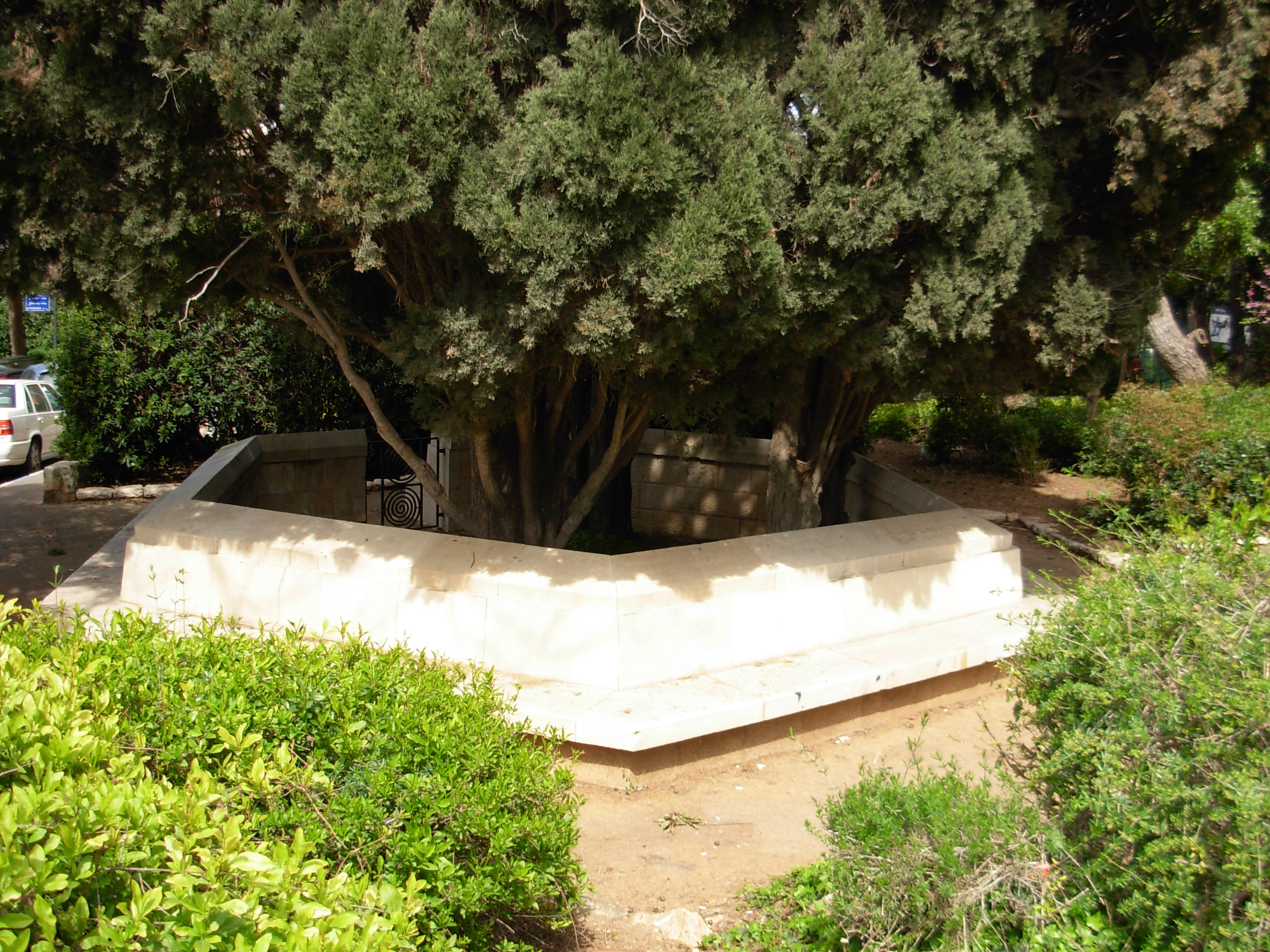 Alexander Baerwald memorial in Carmel center, Haifa